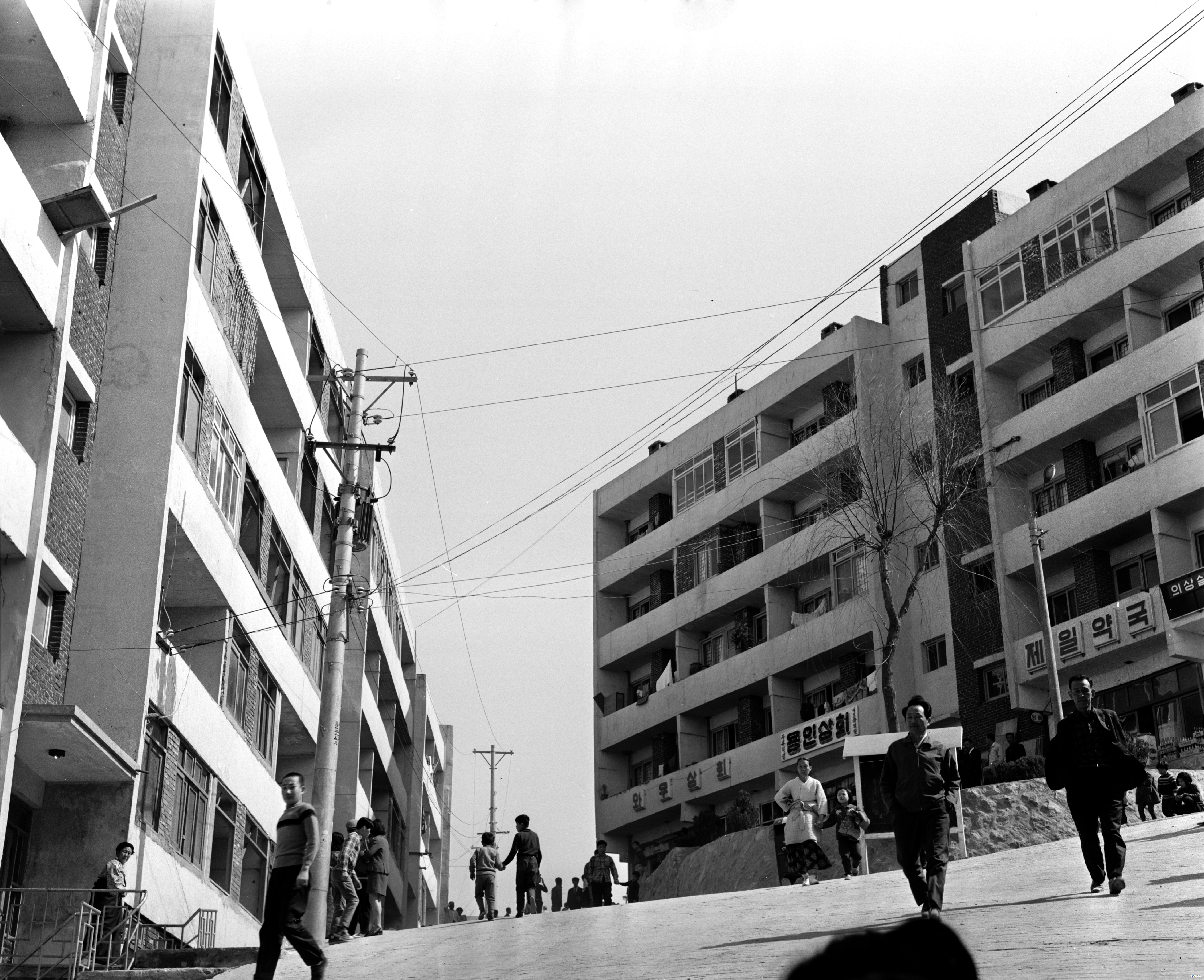 서울특별시 소방재난본부 소장 사진. photos of Seoul Metropolitan Fire & Disaster Headquarters. 이 파일은 크리에이티브 커먼즈 저작자표시-동일조건변경허락 4.0 국제 라이선스로 배포됩니다. 단 누구인지 구별 가능한 특정 인물이 사진에 포함되어 있을 경우 사용 전에 서울특별시 소방재난본부 및 해당 인물의 승인을 받으셔야합니다. 감사합니다. evidence of permission